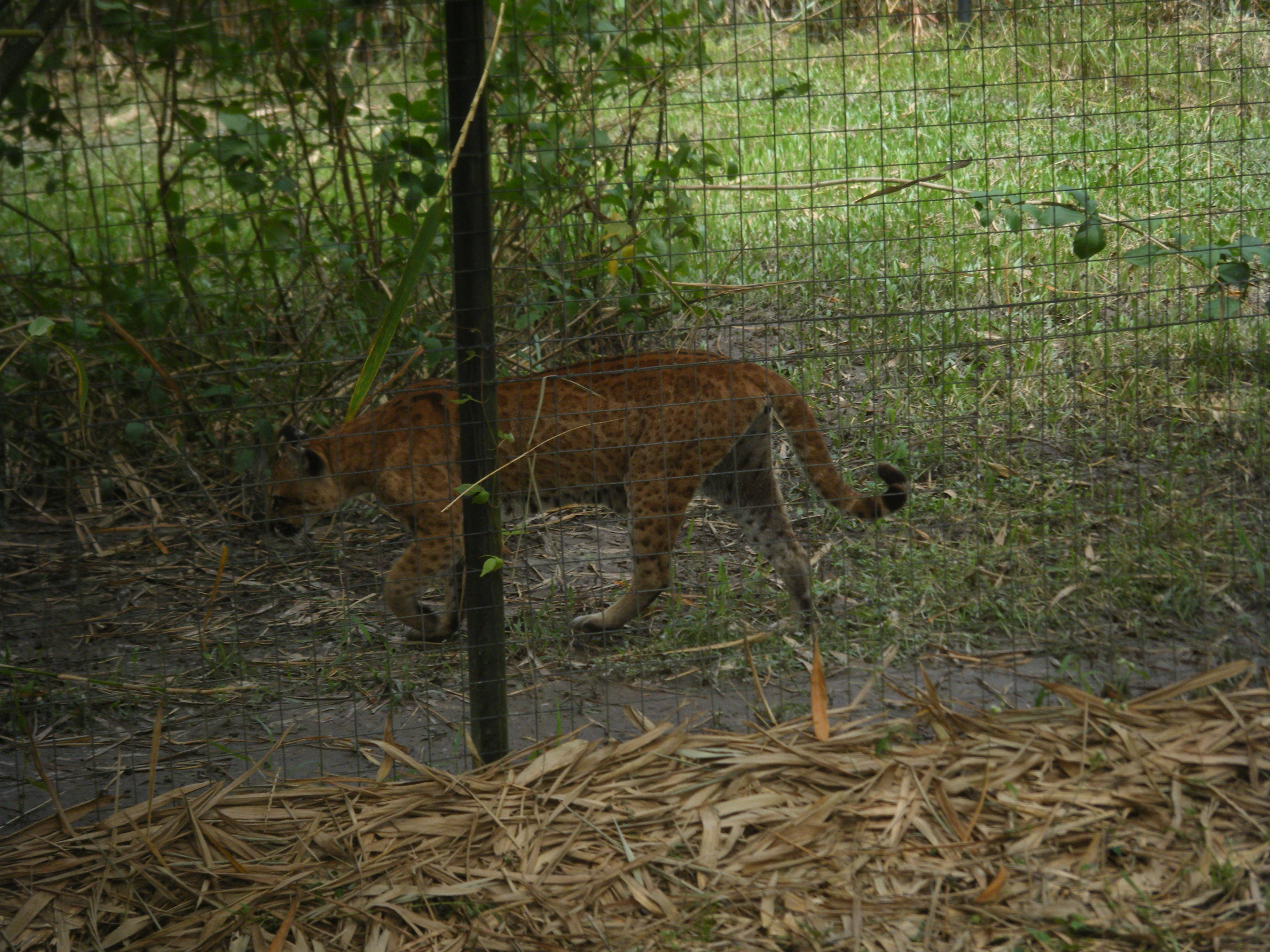 Ocema au zoo de Macouria, Guyane. L'océma est un hybride, issu du croisement d'une femelle d'ocelot avec un puma mâle.